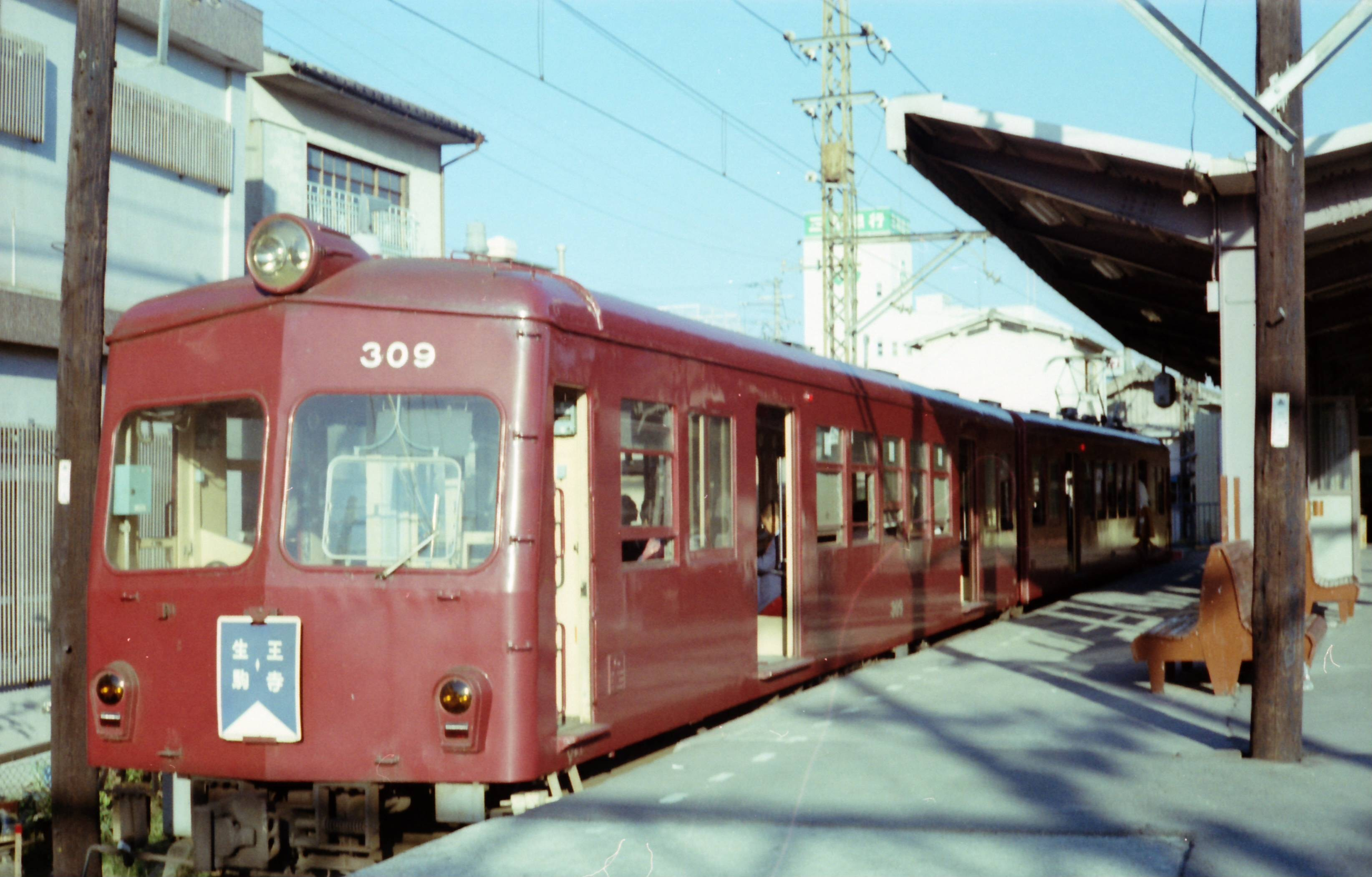 近鉄 309+409 生駒線王寺駅 昭和51年8月